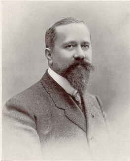 Albert Calmette